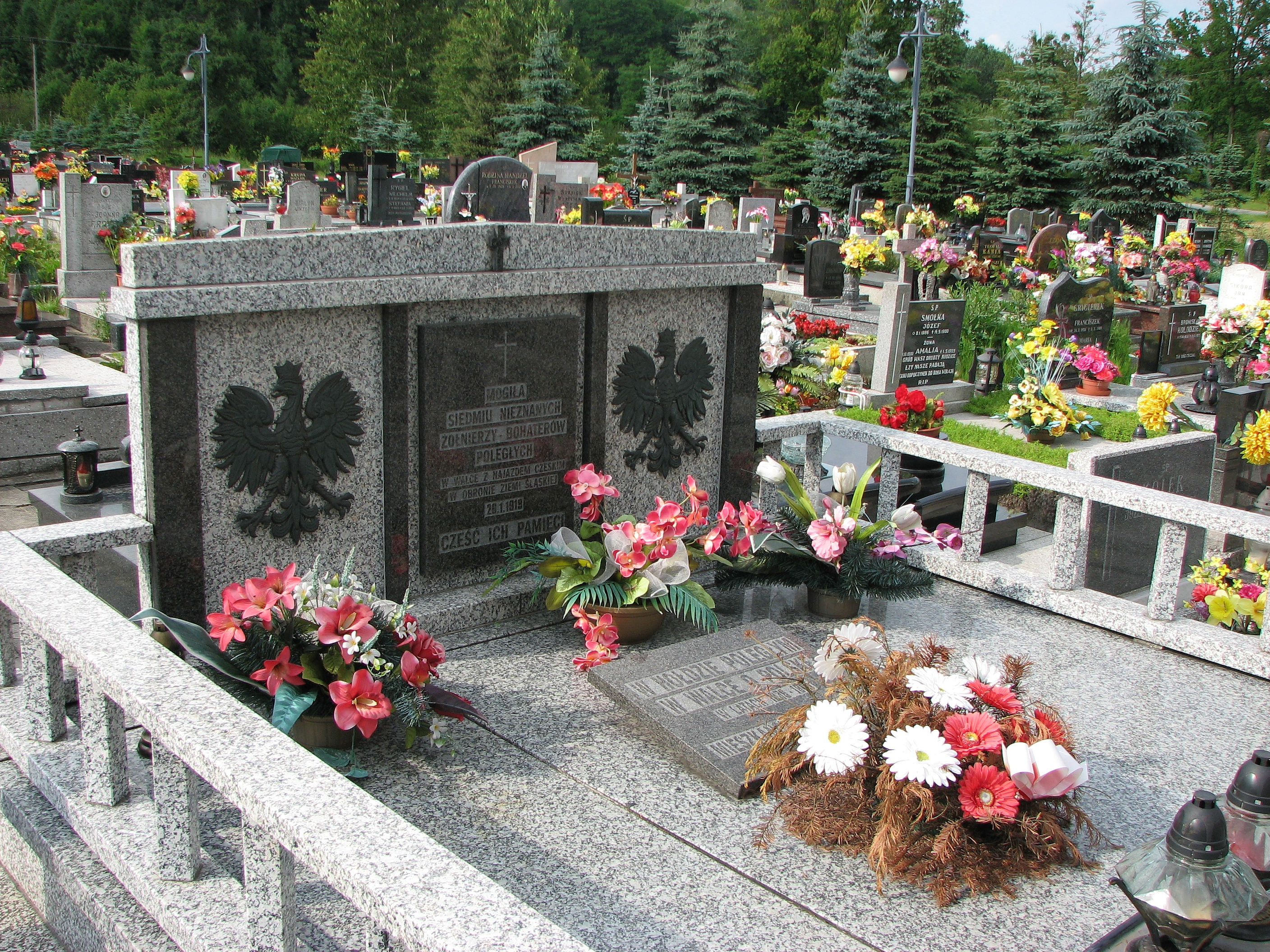 "Mogiła siedmiu nieznanych żołnierzy - bohaterów poległych w walce z najazdem czeskim w obronie Ziemi Śląskiej 26.01.1919" na cmentarzu przy kościele Wniebowstąpienia NMP w Zebrzydowicach